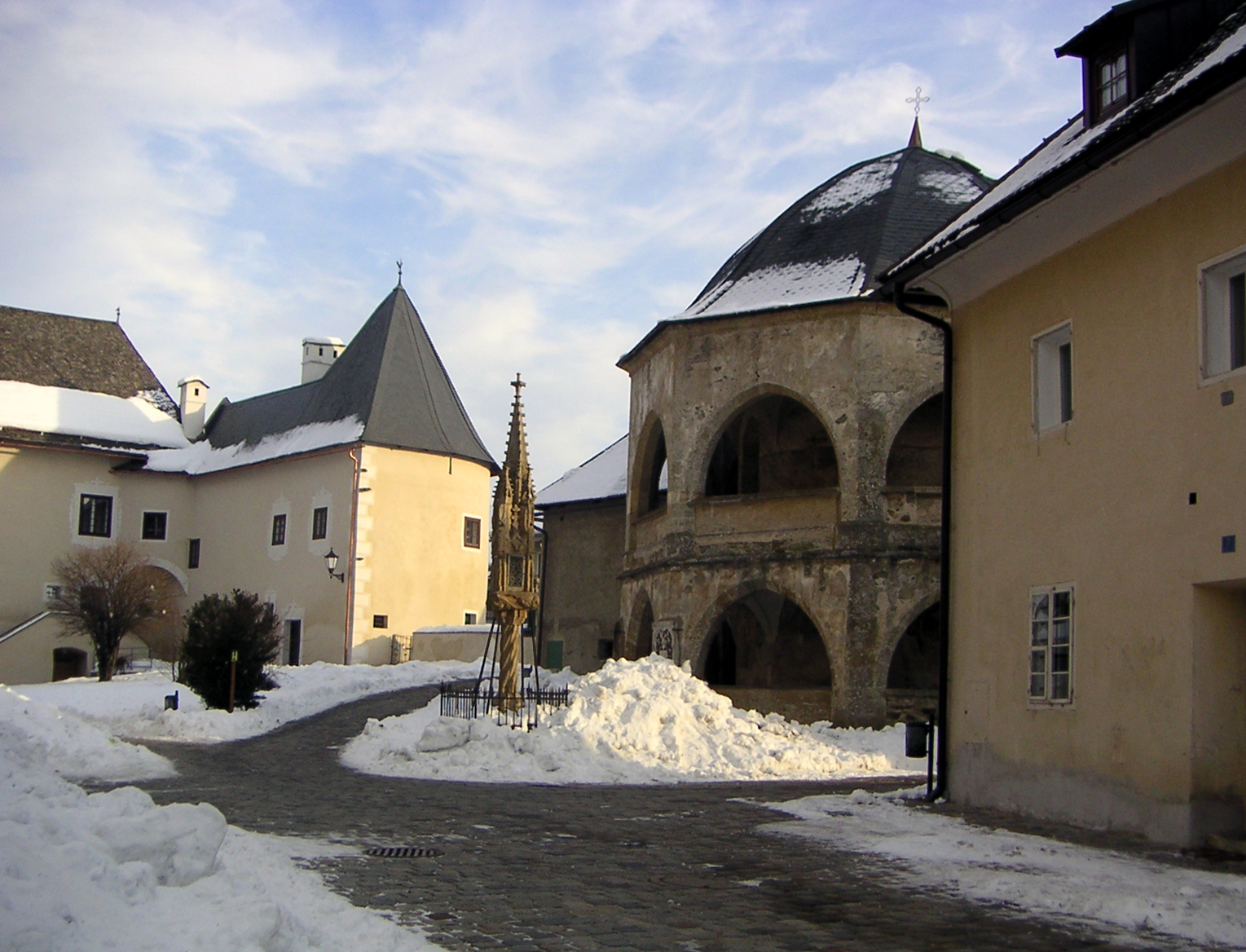 Domplatz in Maria Saal, Kärnten